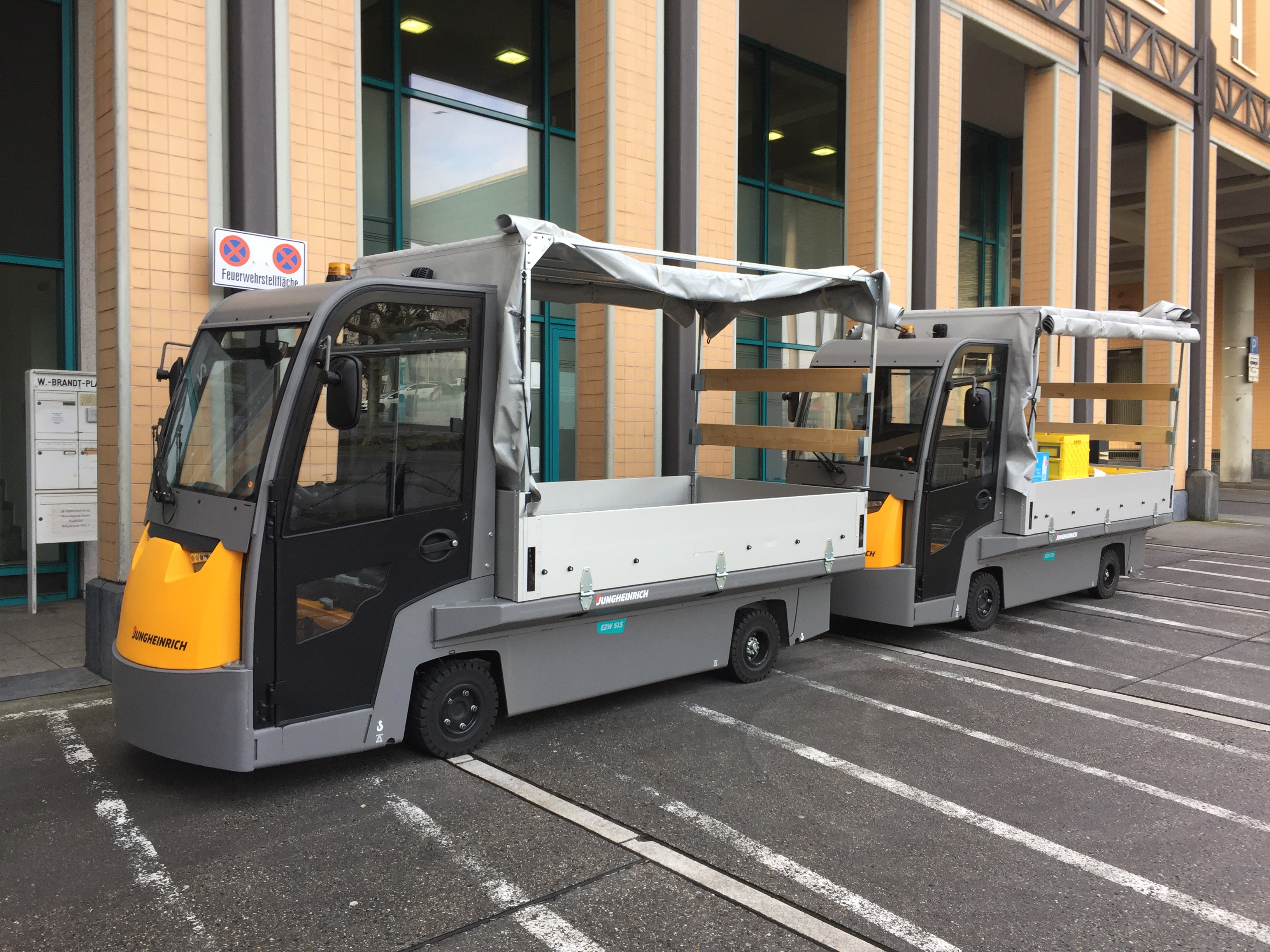 Jungheinrich E-Transporter